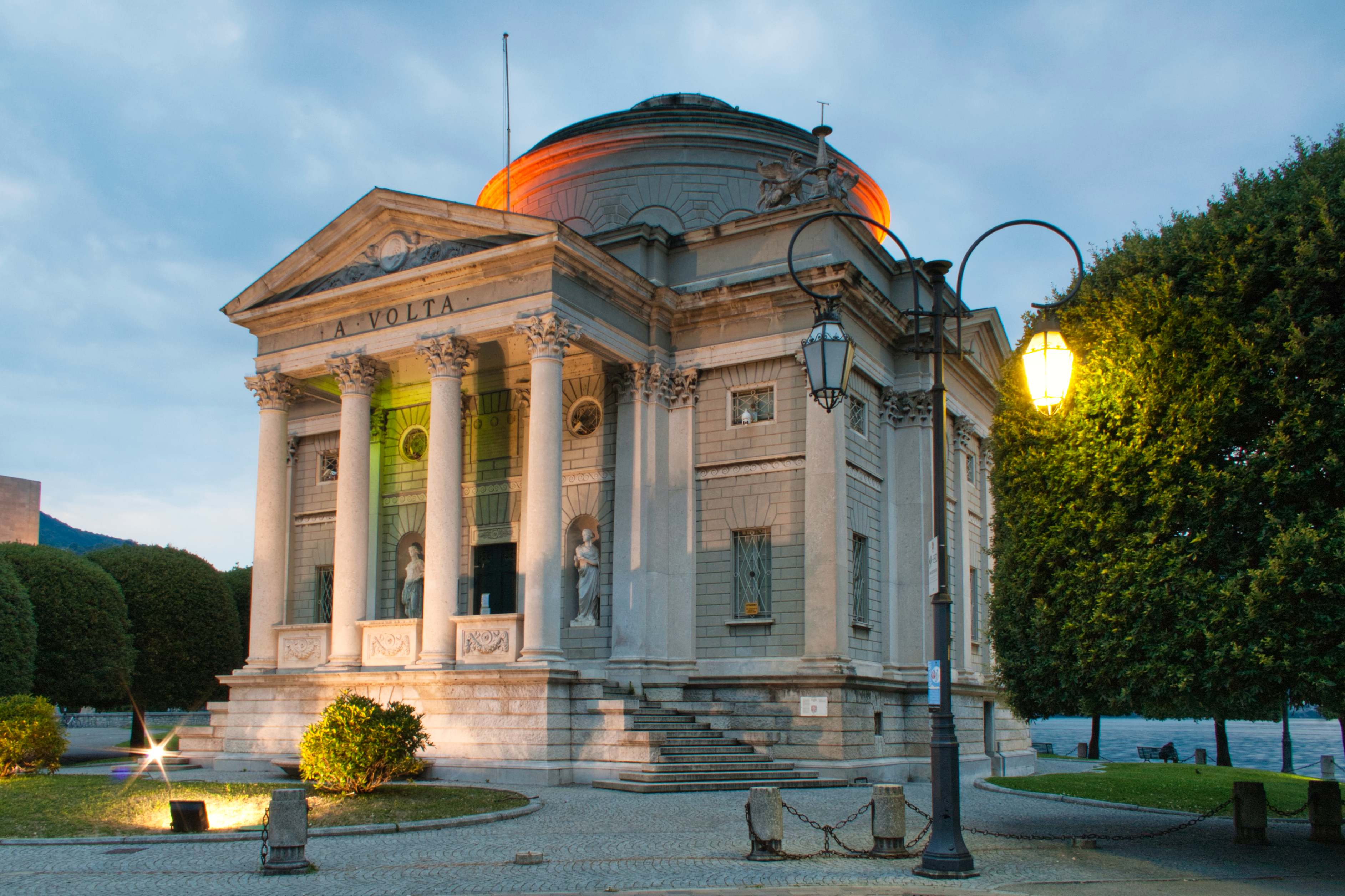 Il Tempio Voltiano di Como in una serata estiva